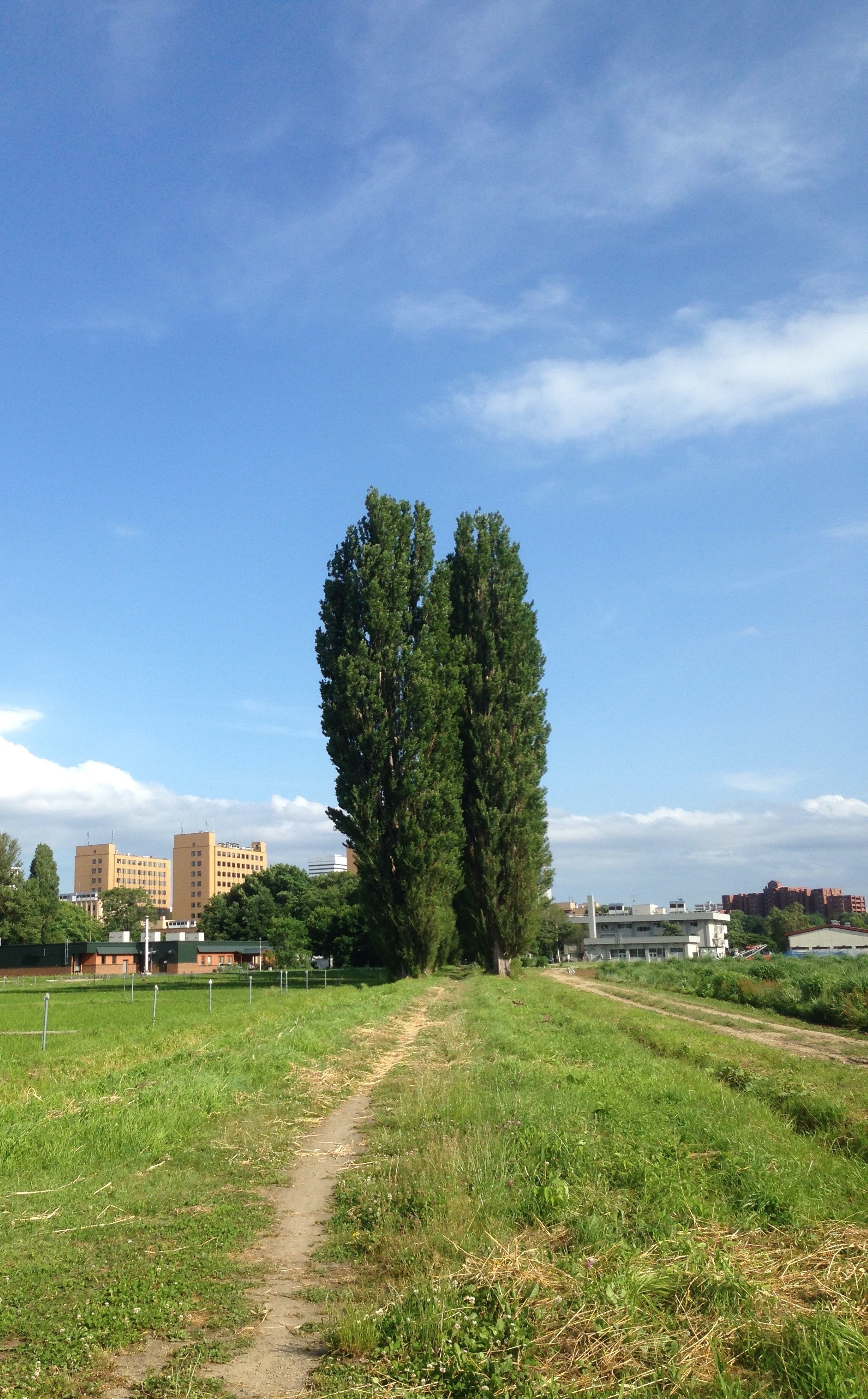 北海道大学のポプラ並木を、北側から撮影した写真です。 ※2014年撮影。この撮影場所は北海道大学の農場内であり、一般人は立ち入りできない可能性があります。なお、投稿者は北海道大学の関係者として撮影を行いました。